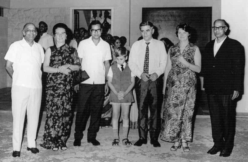 POŻEGNANIE Z WŁADZAMI COLLEGU COIMBATORE 1972